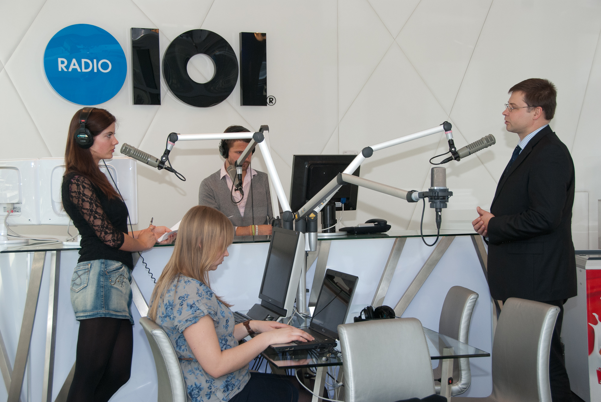 Intervija Radio 101